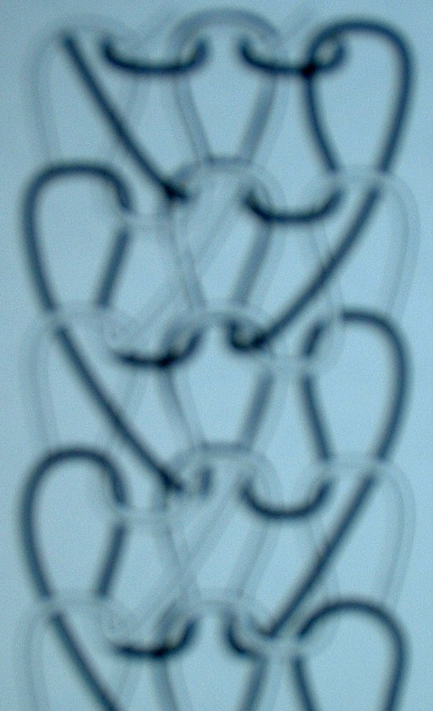 Maschenbild der offenen Köperlegung